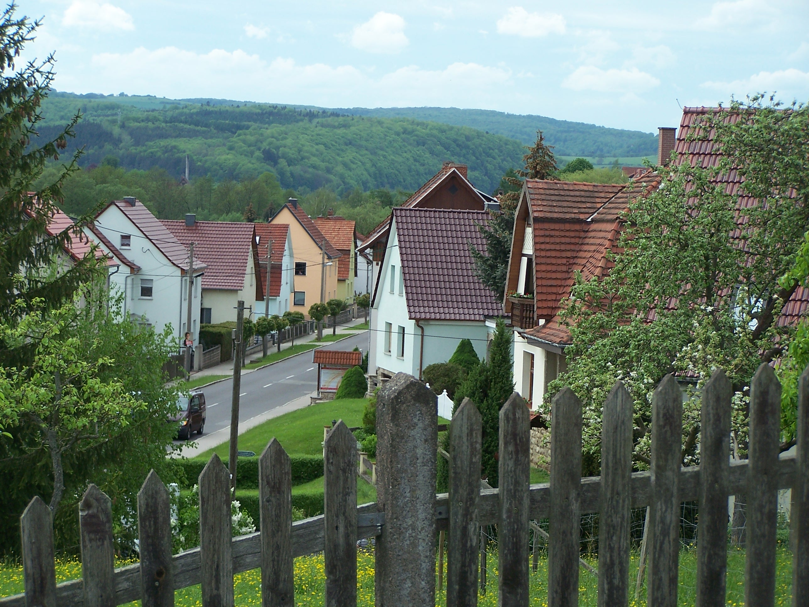 Der nördliche Ortsrand von Lauterbach.